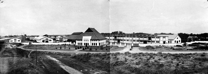 Repronegatief. Panorama van het magazijn met kantoor van de Staatsspoorwegen (S.S.) te Bandung, Java